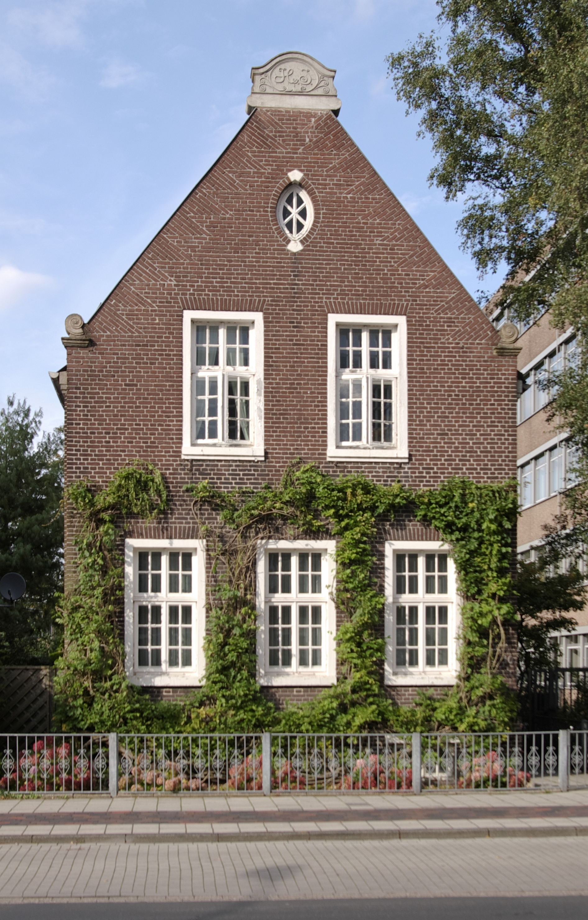 Leer, Ostfriesland. Haus an der Ubbo-Emmius-Straße.